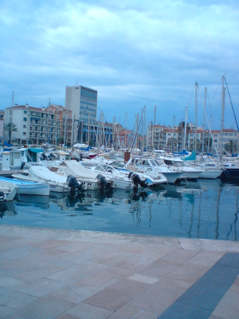 Port de la ville de la Seyne sur mer